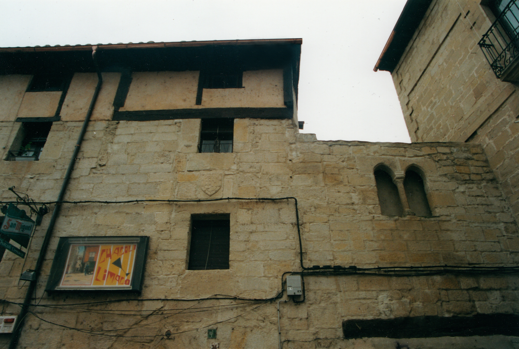 Chacolí Limaco de Miranda de Ebro a comienzos del siglo XXI. En esta localidad durante el siglo XX las tabernas normalmente se denominaban "Chacolís", porque originariamente servían esta bebida de producción local muy extendida entonces